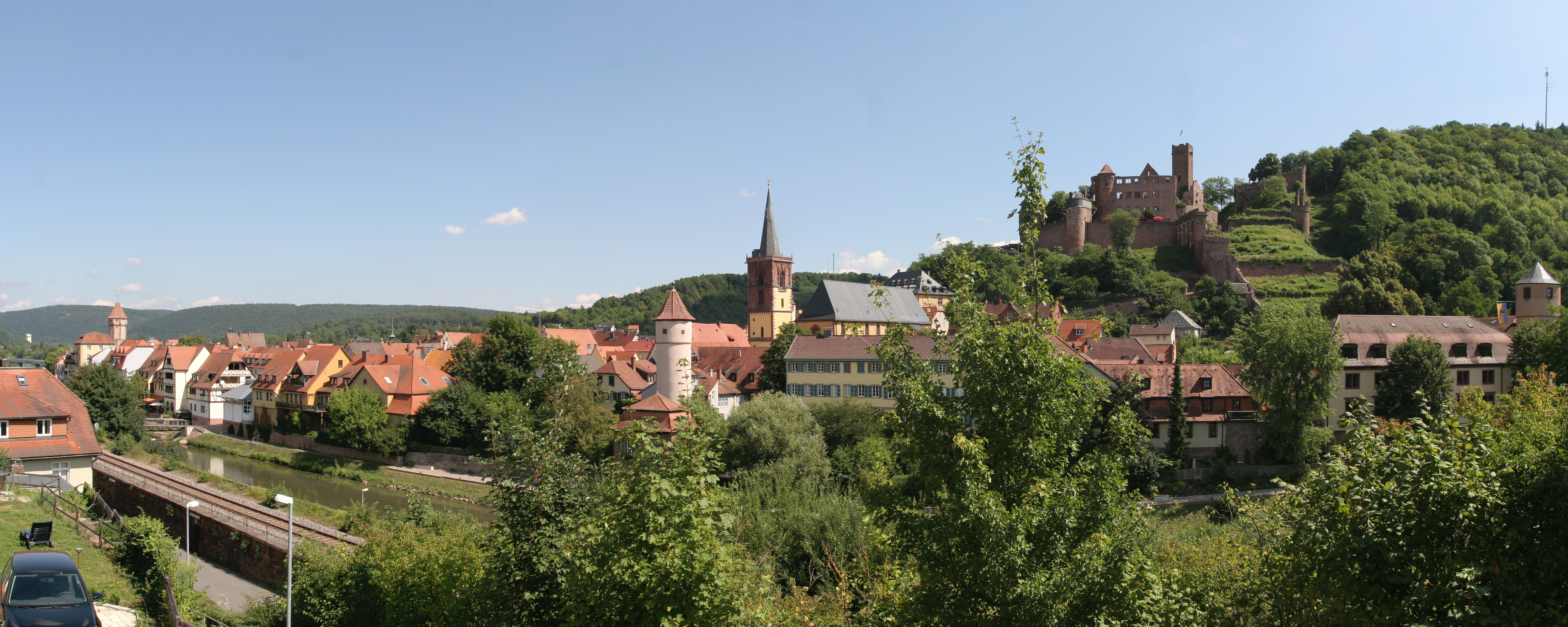 Panoramabild von Wertheim am Main. Zusammengesetzt aus 3 Einzelaufnahmen mit Hugin. Horizontaler Bildwinkel ca. 110°. Bzgl des Kamerastandortes siehe hier (Notizen)